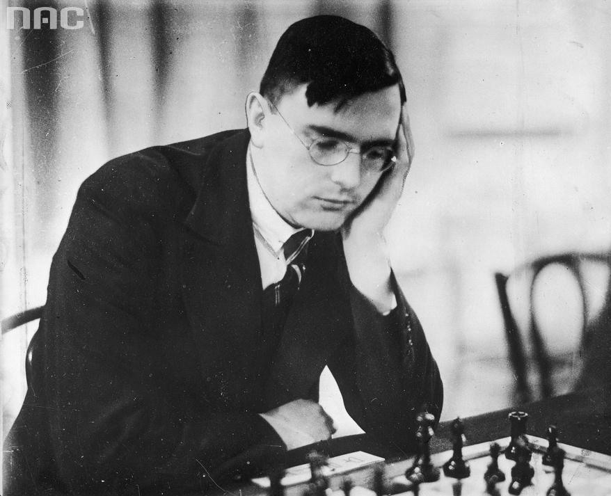 Max Euwe in 1935 during WC match (against Aleksandre Alechine)